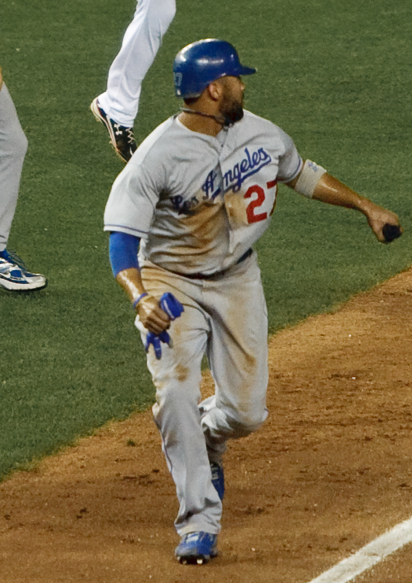 Matt Kemp